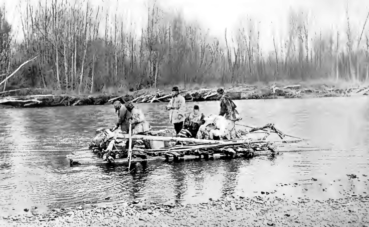 Jesup North Pacific Expedition: Waldemar Jochelson (Mitte) und einige Helfer befahren den Korkodon auf einem einem Floß.